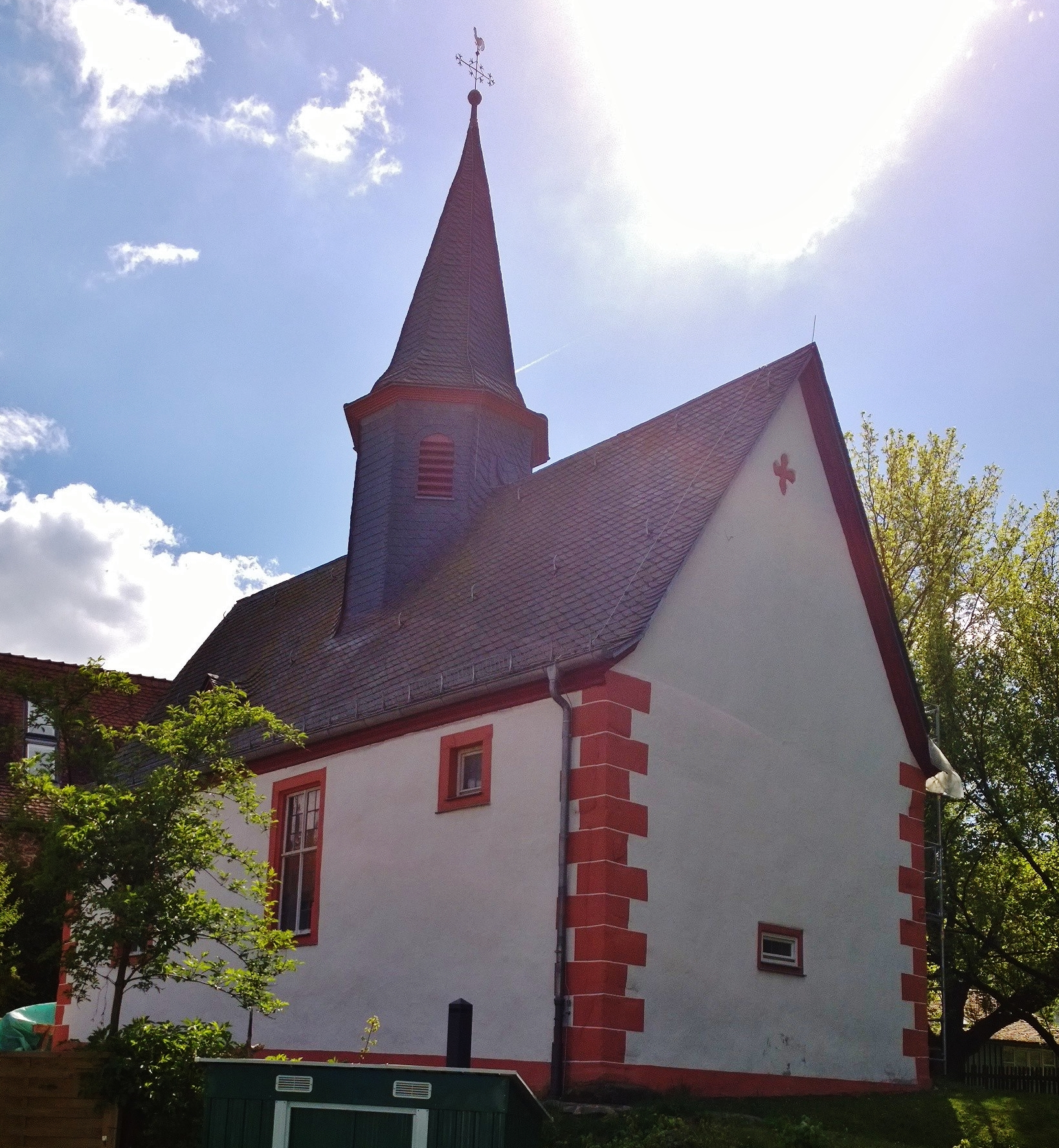 Die Kirche von Enzheim unterhalb der Insel der abgegangenen Wasserburg